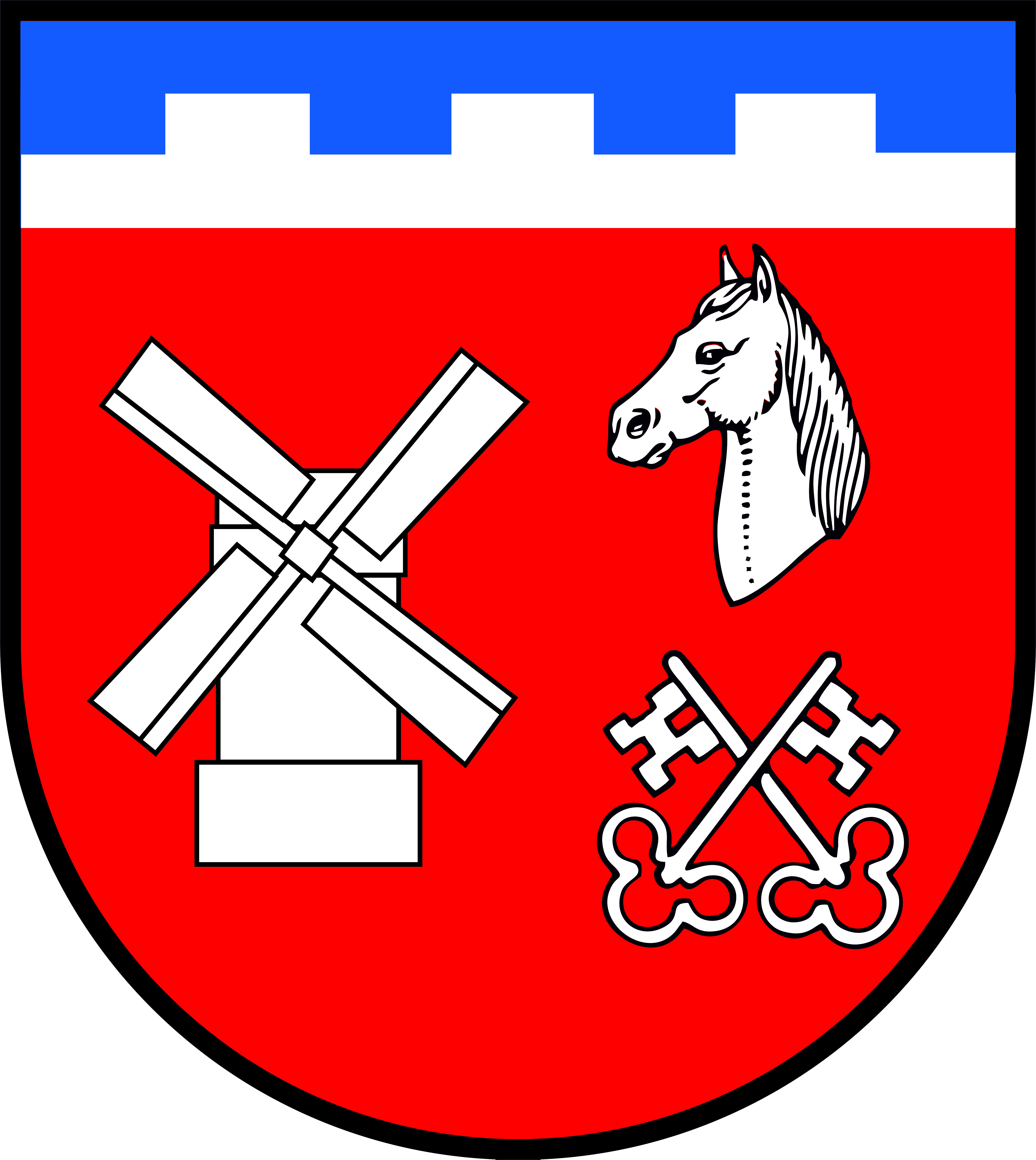 Blasonierung: "Unter blau über silber durch Zinnenschnitt geteiltem Schildhaupt, drei silberne Zinnen bildend, rot, vorn silberne Windmühle, hinten über silbernen gekreuzten Schlüsseln, Bärte abwärtsgewendet, abgeschnittener silberner Pferdekopf."